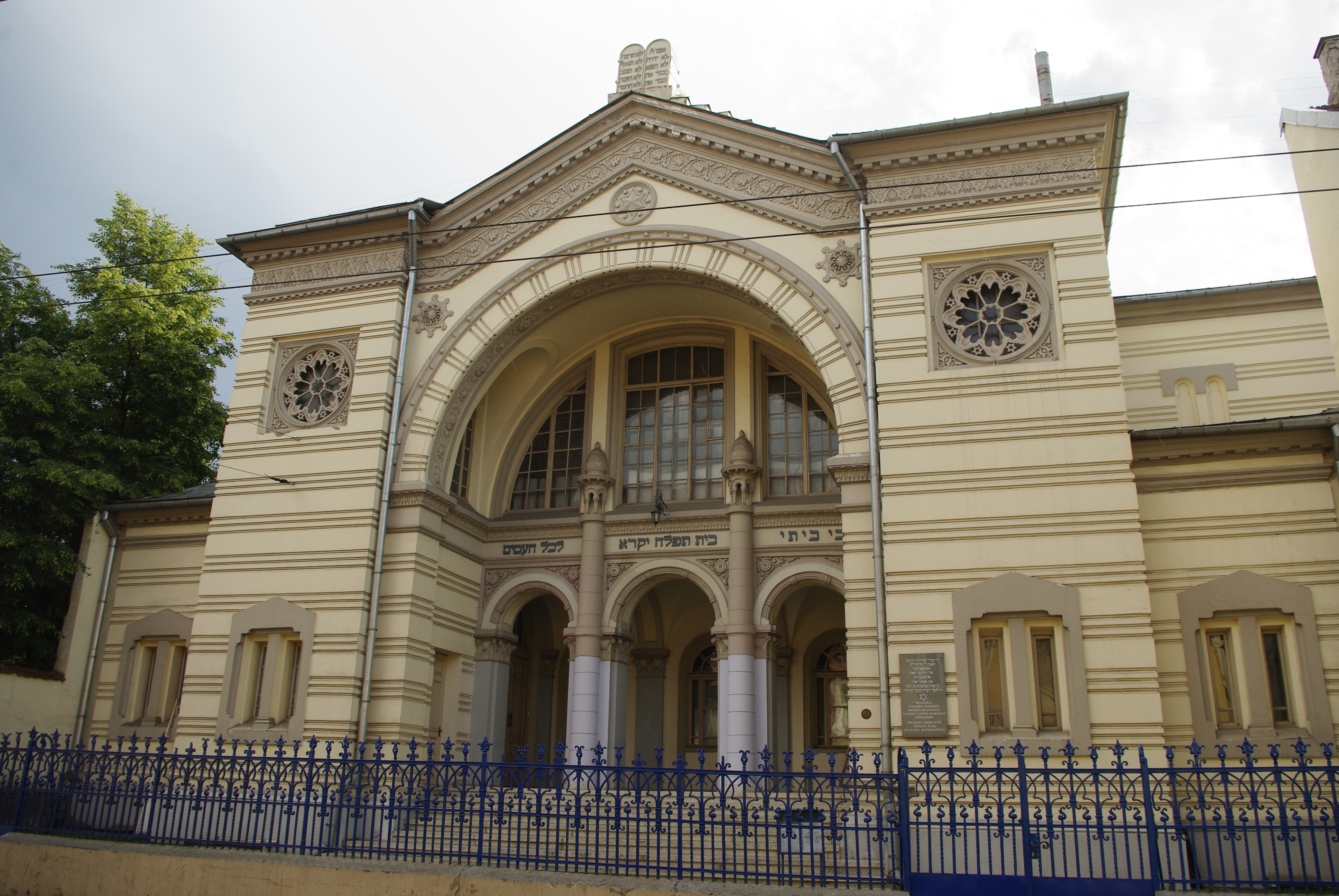 Façade de la synagogue chorale de Vilnius